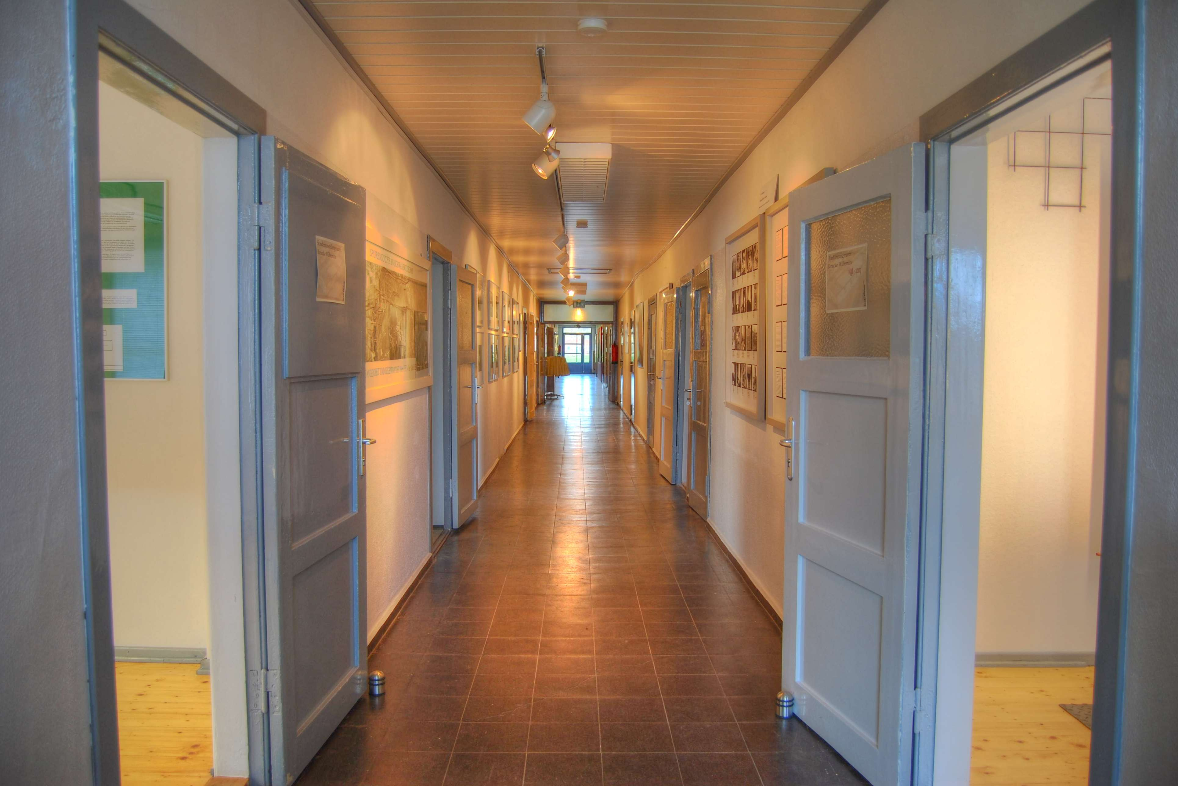 Flurbereich in der Gedenkstätte Baracke Wilhelmine in Schwanewede-Neuenkirchen in Niedersachsen/Deutschland.